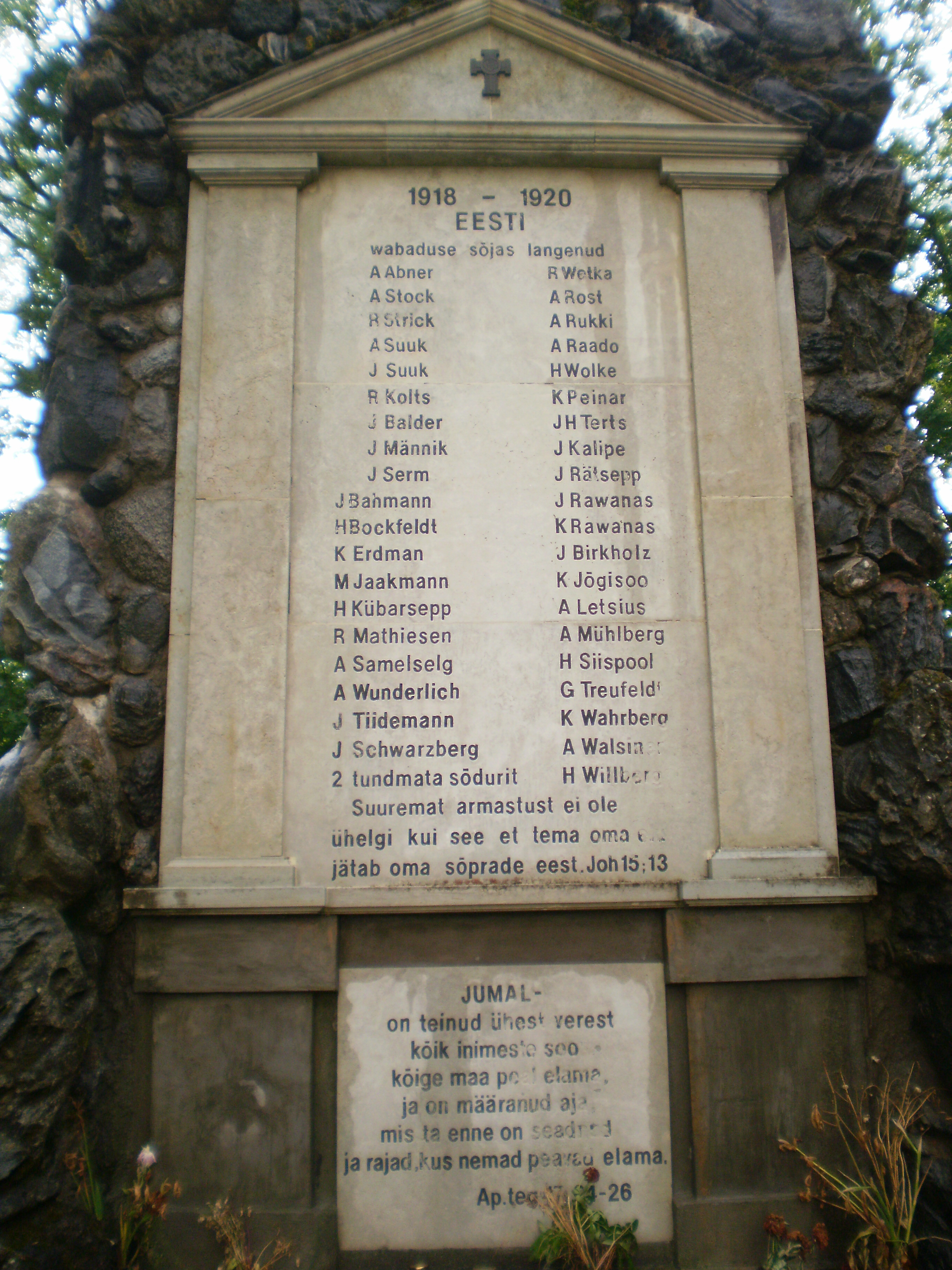 Kadrina kalmistul asuv Vabadussõja mälestussammas, kavandatud Kadrina Katariina koguduse õpetaja Gustav Johannes Beermanni poolt